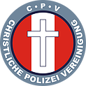 Dieses ist das Logo der CPV Österreich